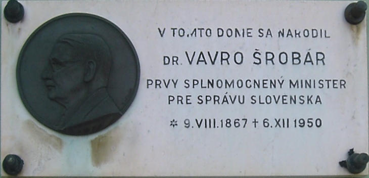 cut out